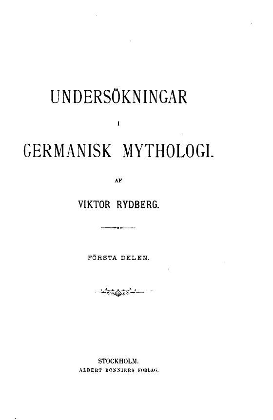 Tittelblad Rydbergs "Undersökningar i Germanisk mythologi." (1886)